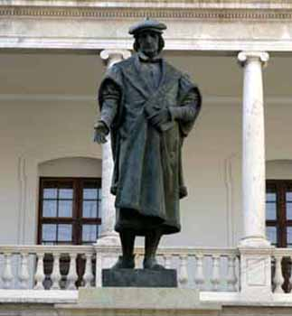 Escultura de Luis Vives, obra de Aixa y fundida en bronce por Vicente Rios que se encuentra en la Universidad de Valencia